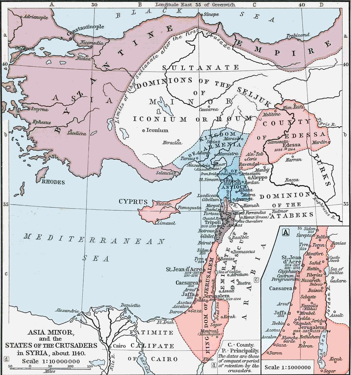 Asia Minor ca. 1140 CE.